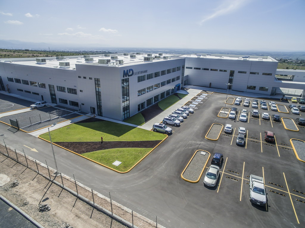 Im Juni eröffnete MD ELEKTRONIK seinen Standort im mexikanischen León